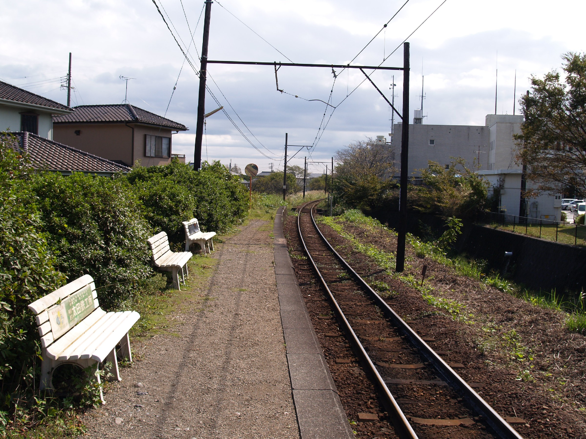 代官町駅ホーム